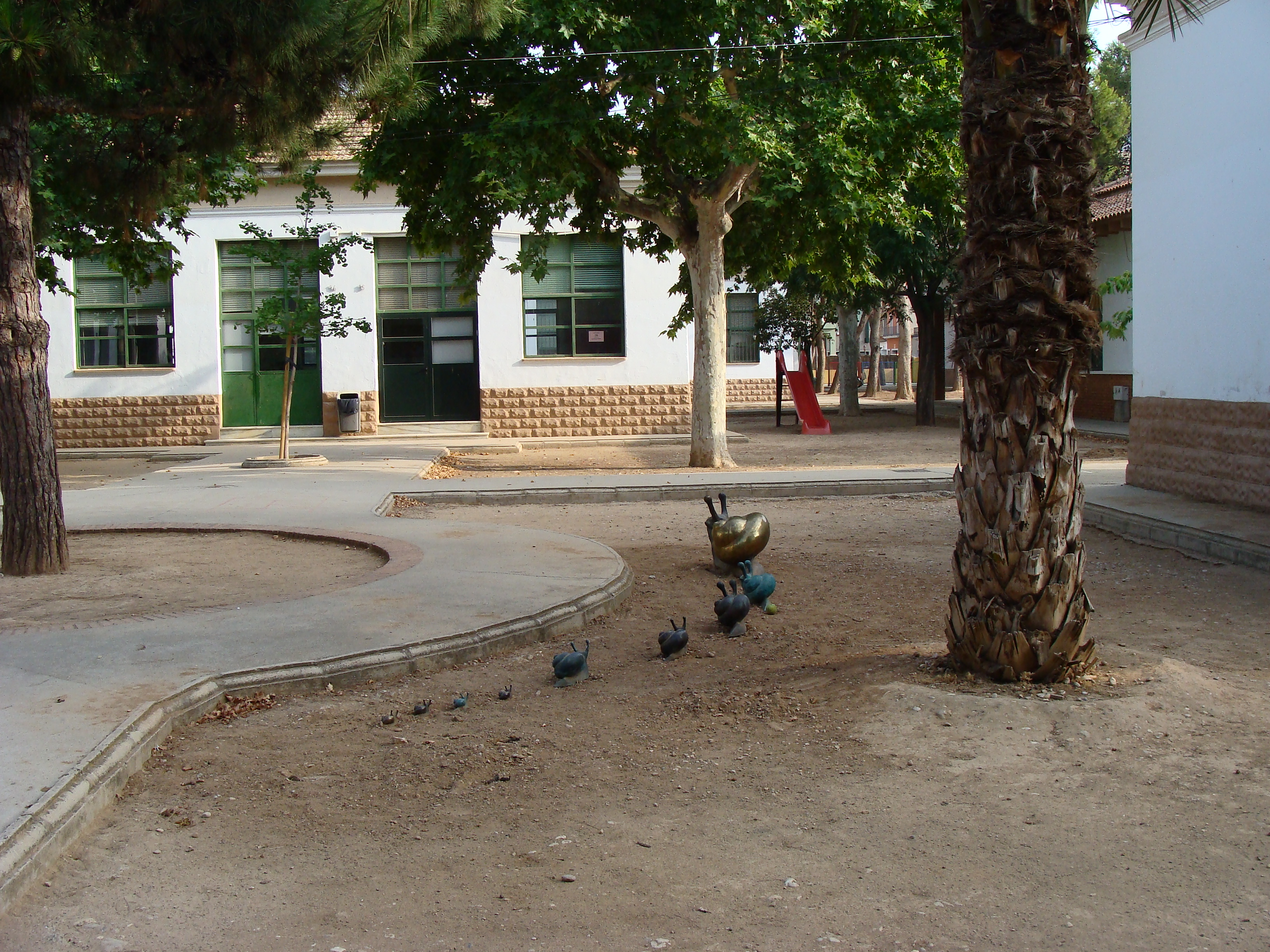 Parque escolar mostrando una de las aulas independientes del mismo